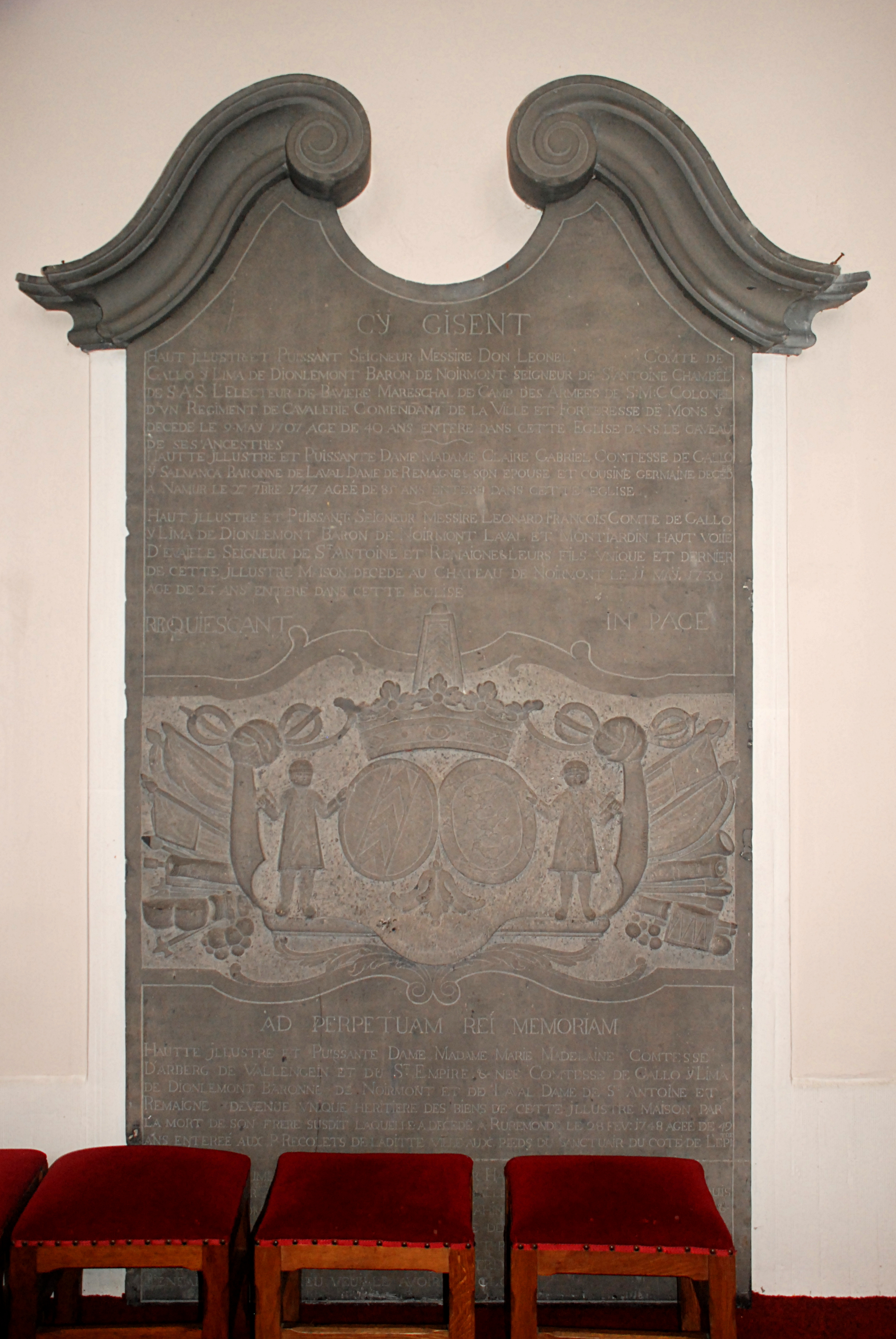 Belgique - Brabant wallon - Chastre - Cortil-Noirmont - Église Saint-Pierre de Noirmont - Monument funéraire des comtes de Gallo